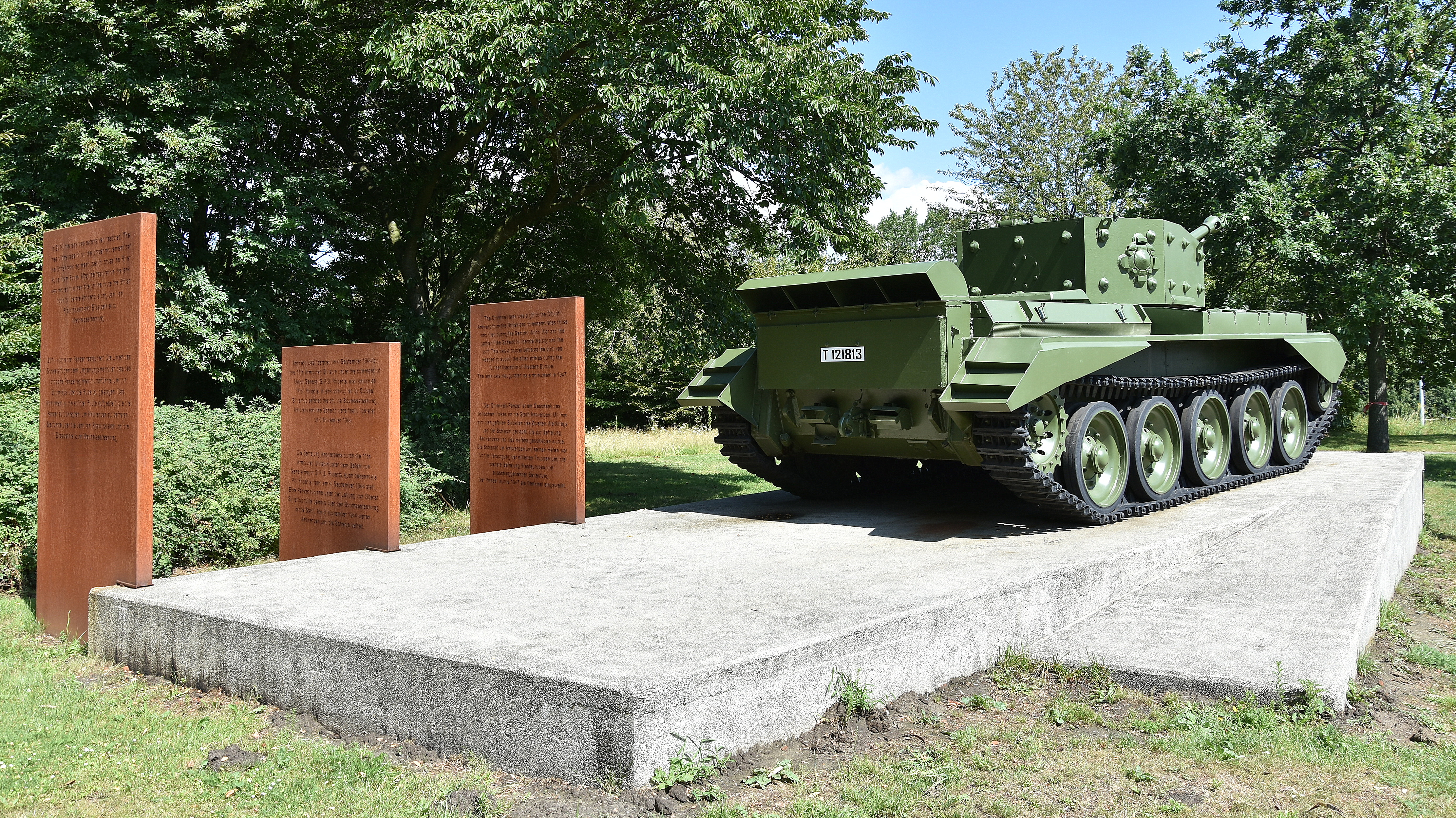 Tankmonument (Antwerpen) 29-07-2019 12-31-38 — Cromwell Mark V (T 121813) This photo of immovable heritage has been taken in the Flemish Region